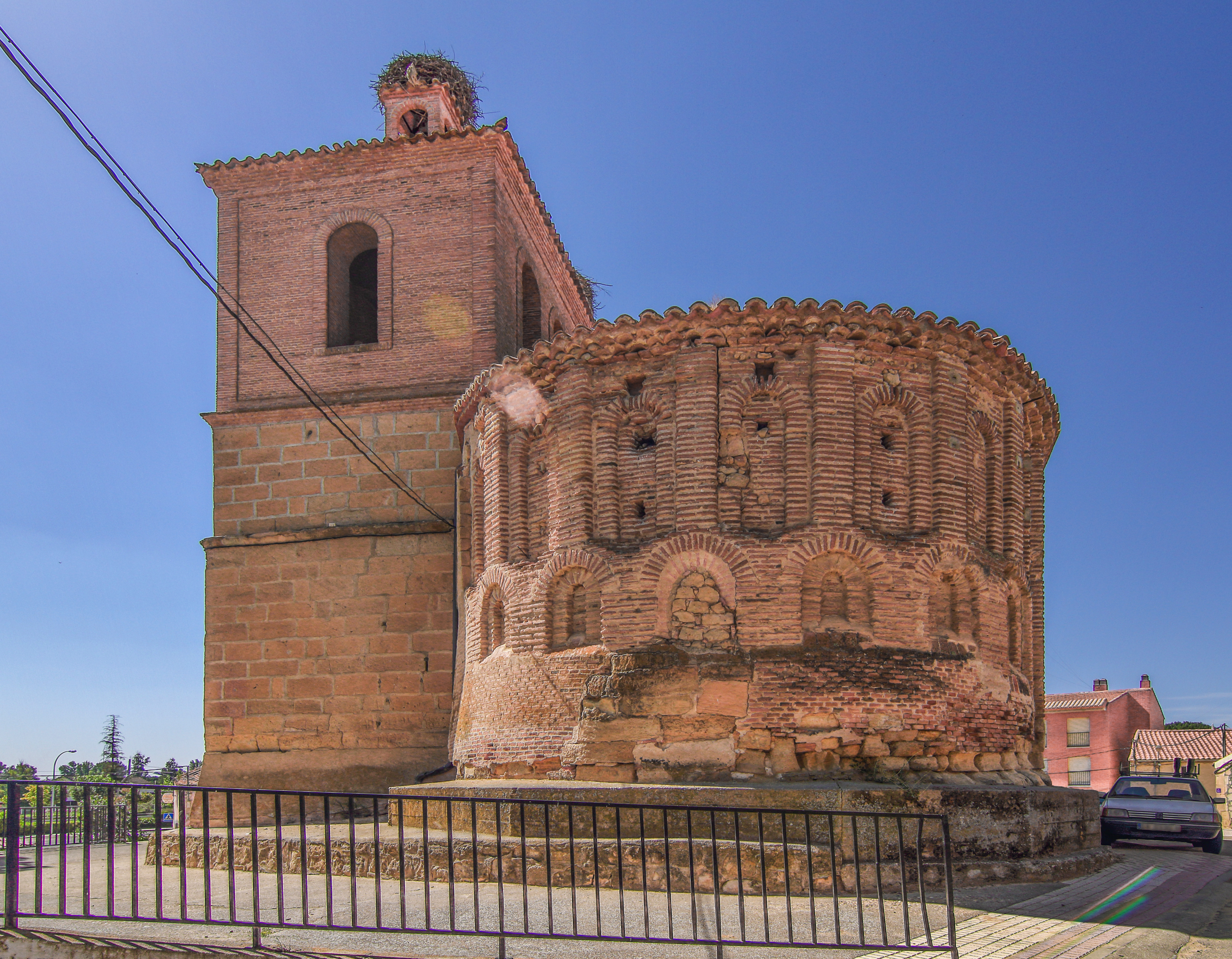 Iglesia de Santiago, ábside y torre